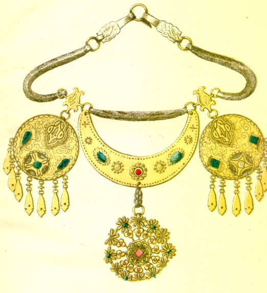 Намисто Розанди Лупул. Зберігалося в Спаській Паліївській церкві у Білій Церкві.